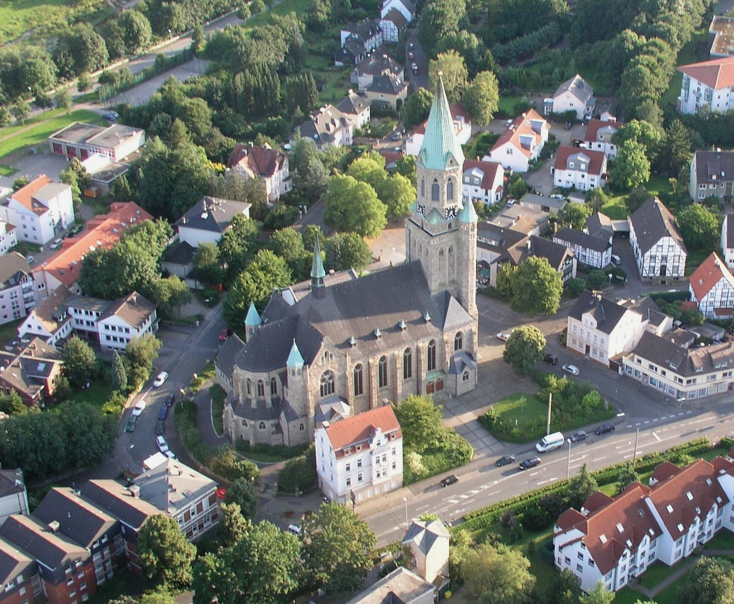 Blick auf die St. Kilian Kirche (Iserlohn Letmathe) aus der Luft. Weitere Luftbilder der Kirche und von Iserlohn auf